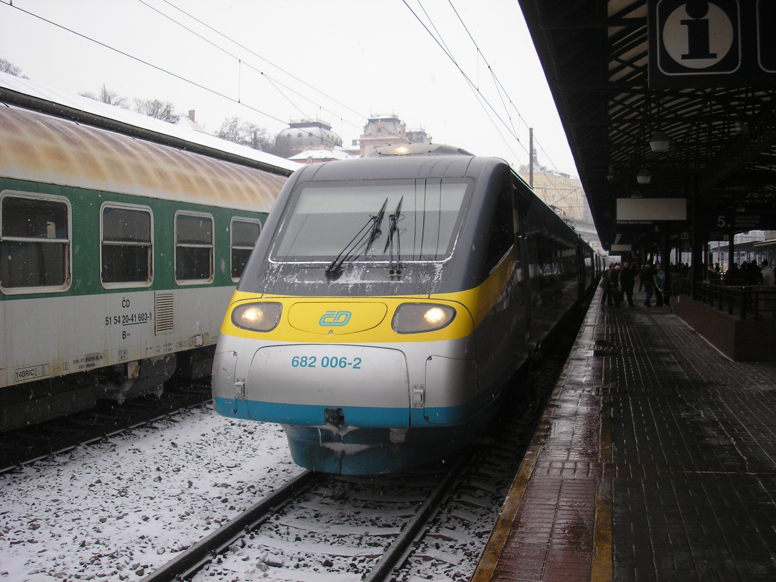 Pendolino der České dráhy